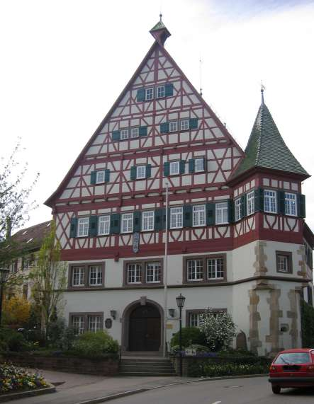 Das Rathaus von Münchingen